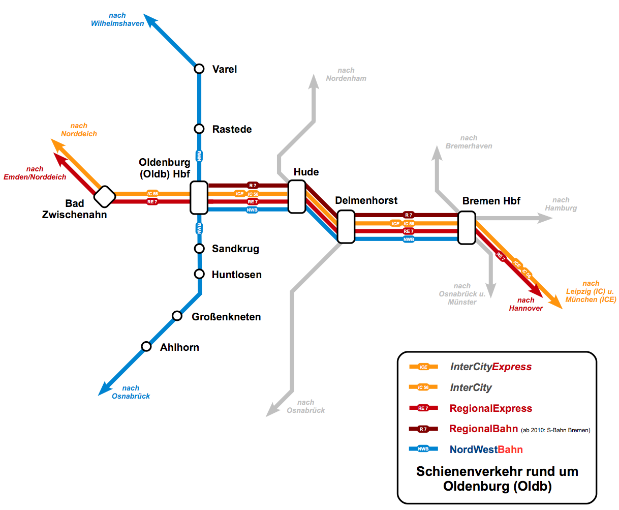 Schienennetz rund um Oldenburg. Siehe auch: Oldenburg (Oldenburg) Hauptbahnhof